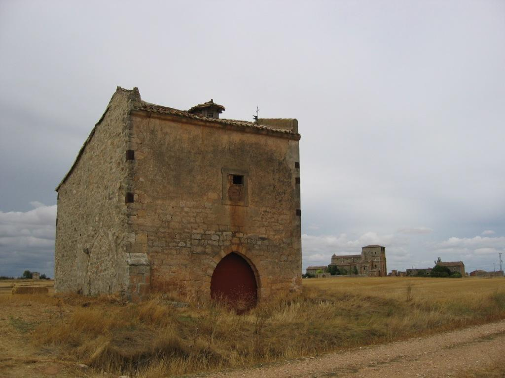 Villamoron_Palacio